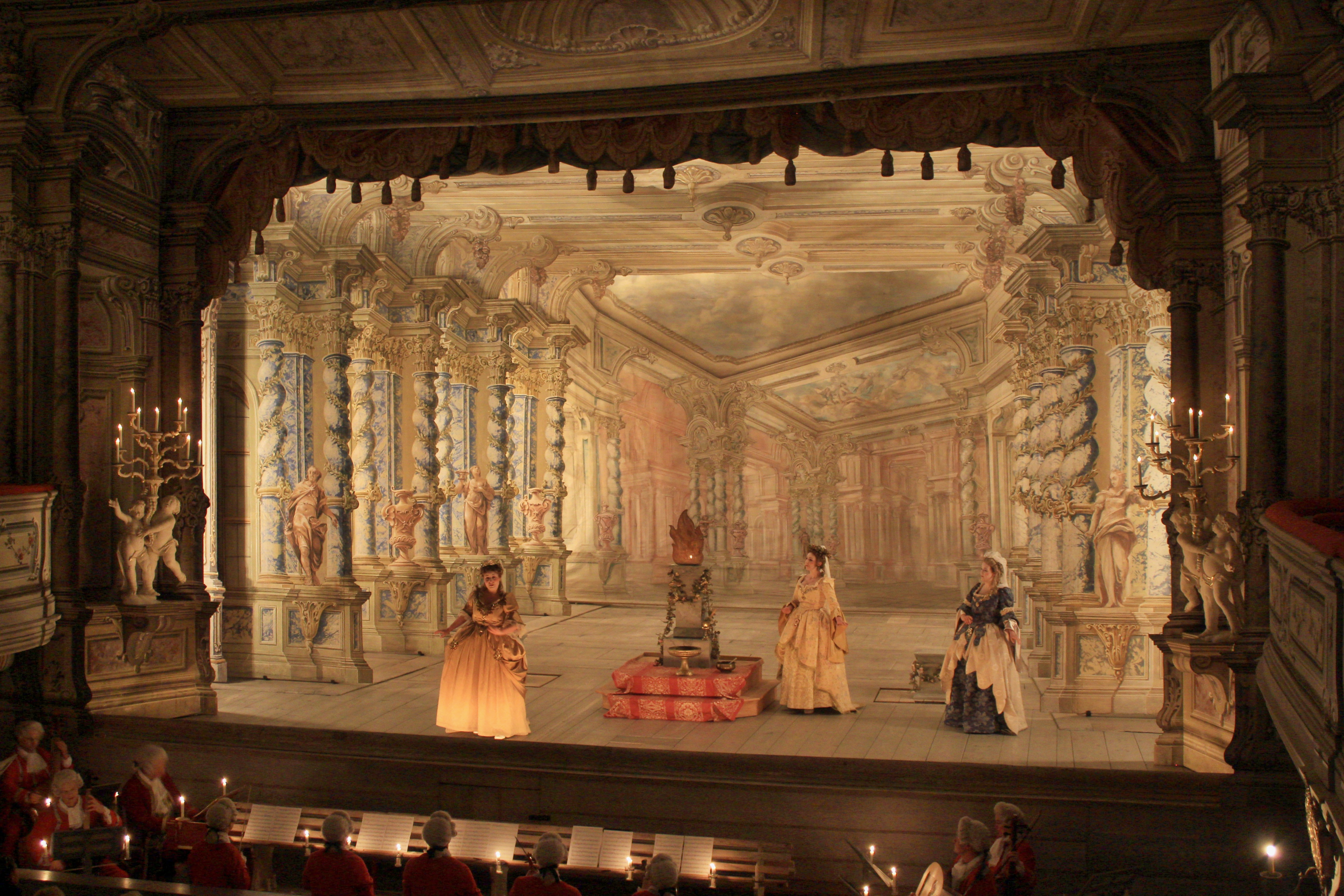 Představení opery Antonia Caldary "Il natale d’Augusto" v barokním zámeckém divadle v Českém Krumlově